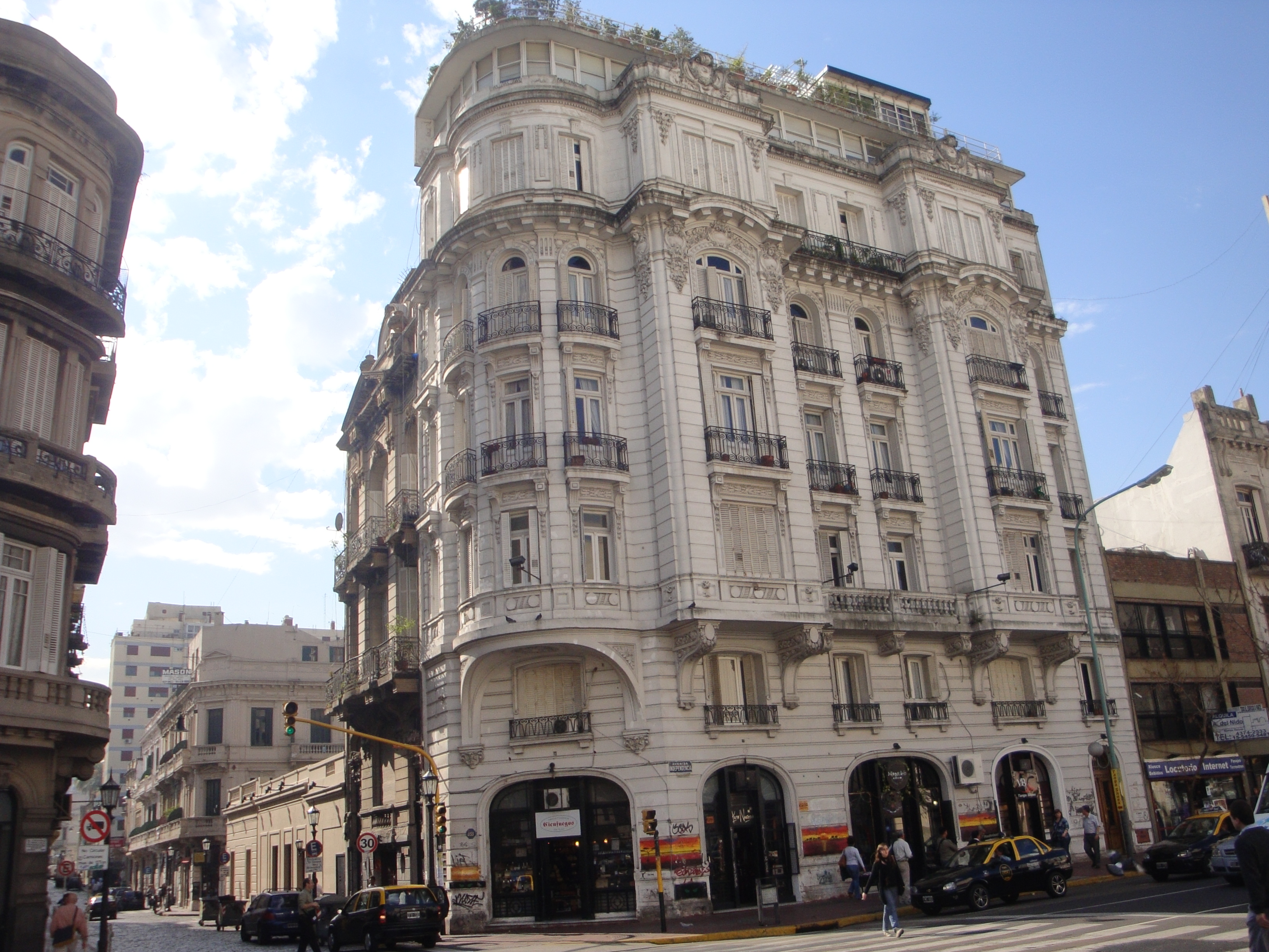 Intersección de las calles Defensa y la Avenida Independencia, en el barrio de San Telmo, Ciudad de Buenos Aires.